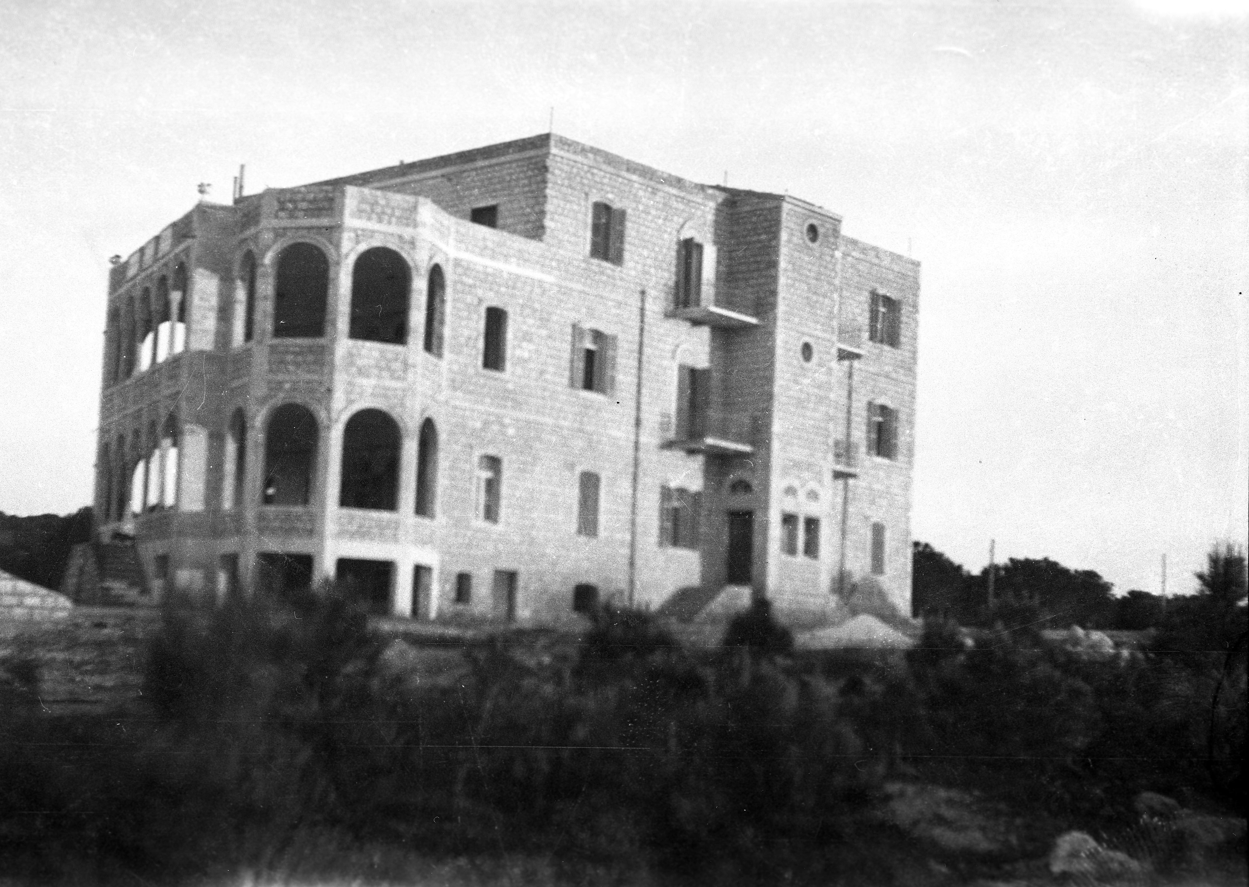 אחד המבנים בהם שכן מלון הרצליה. היום רחוב יפה נוף